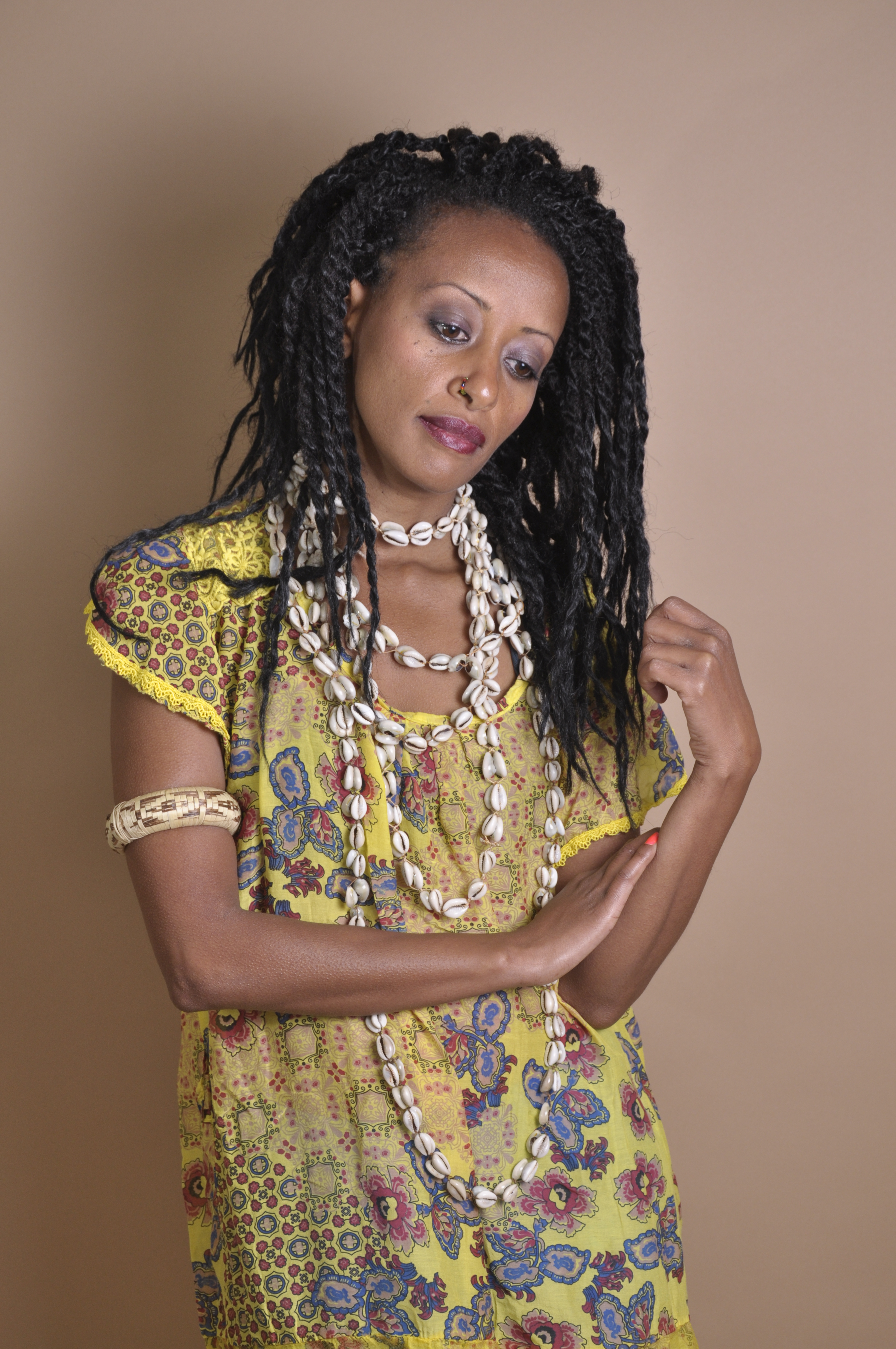 דיוקן האמנית